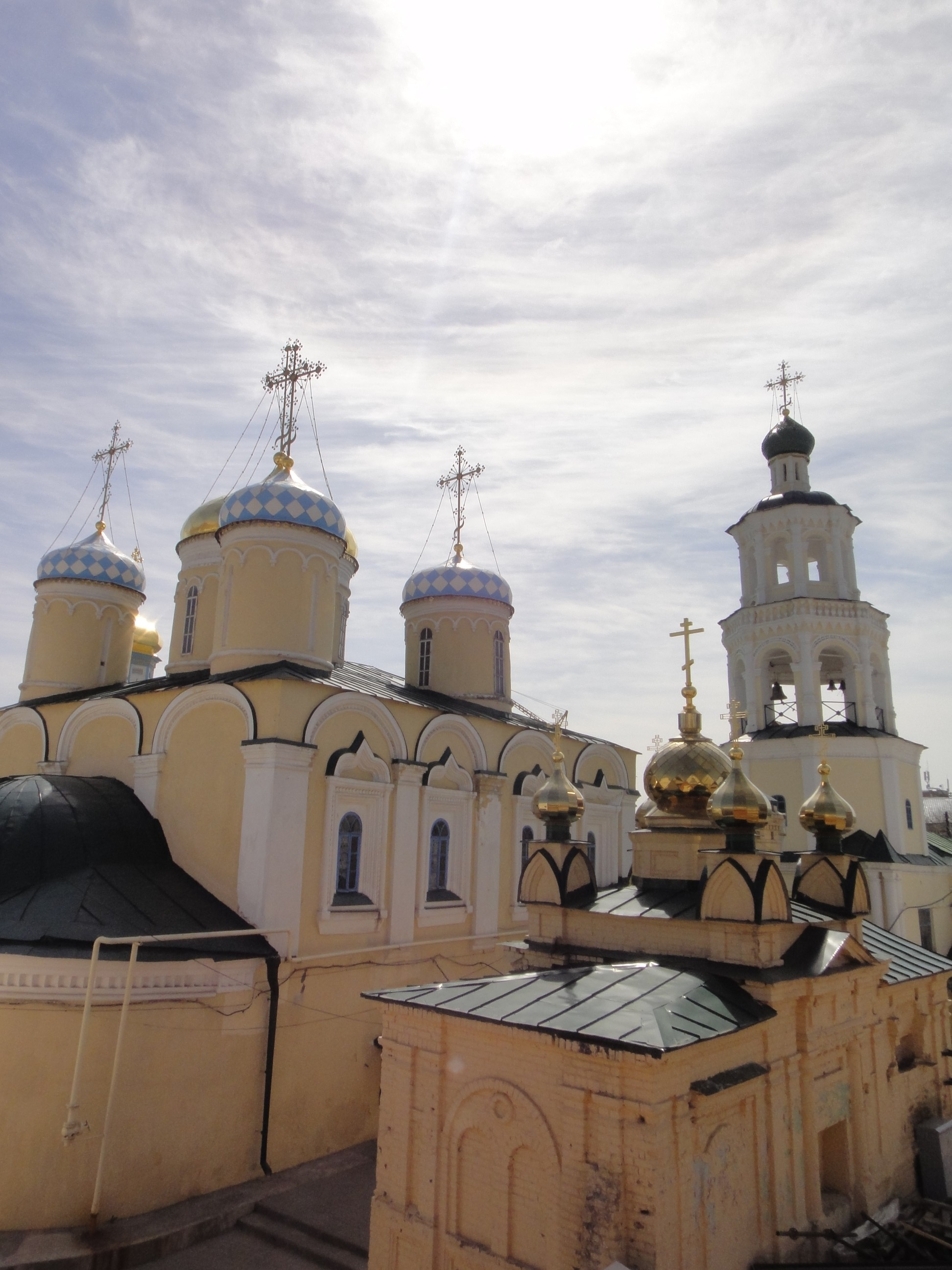 Покровская церковь и колокольня ансамбля Никольского кафедрального собора в Казани. Вид с севера с Профсоюзной улицы.